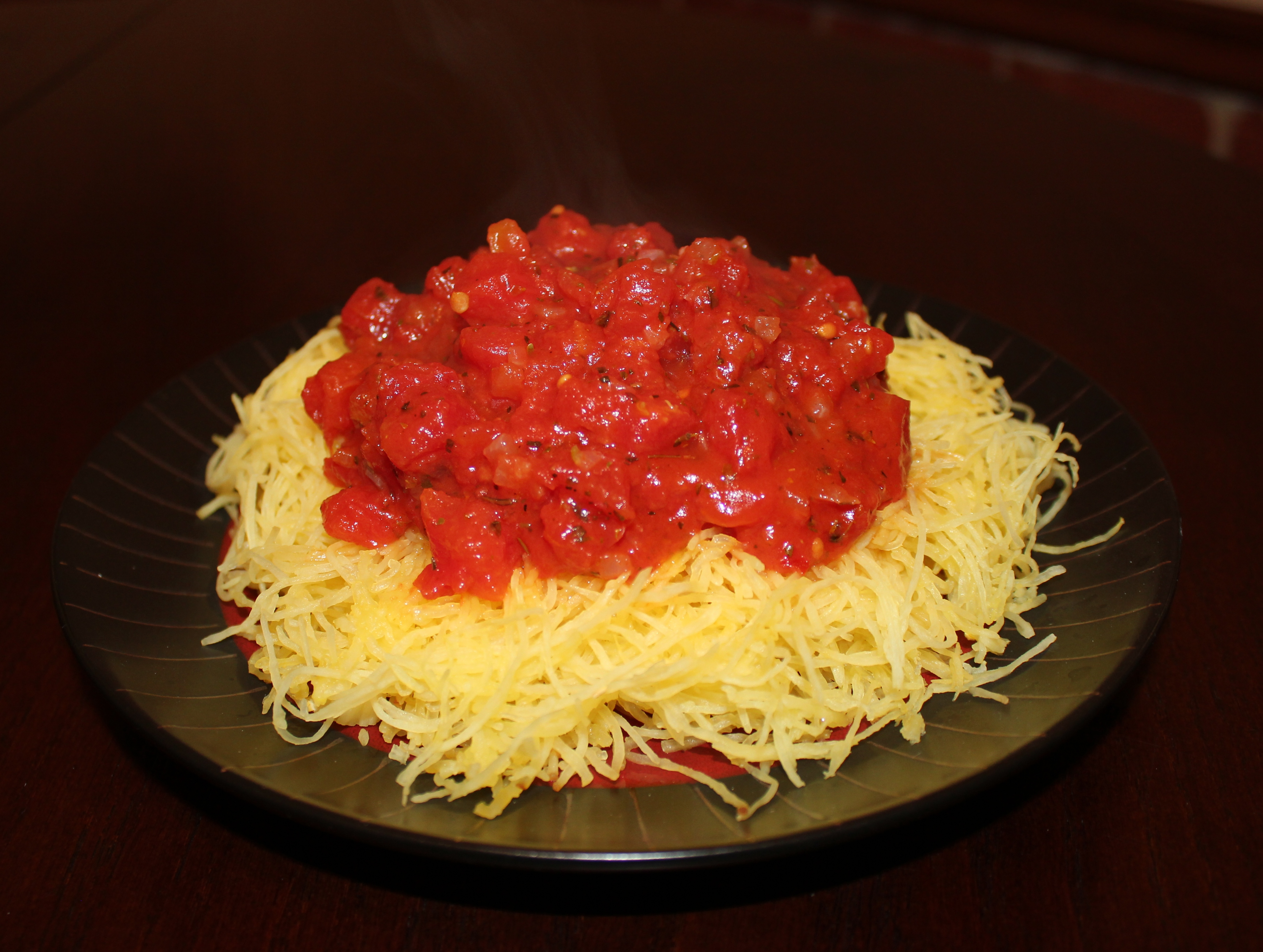 Spaghetti Squash Marinara recipe available at